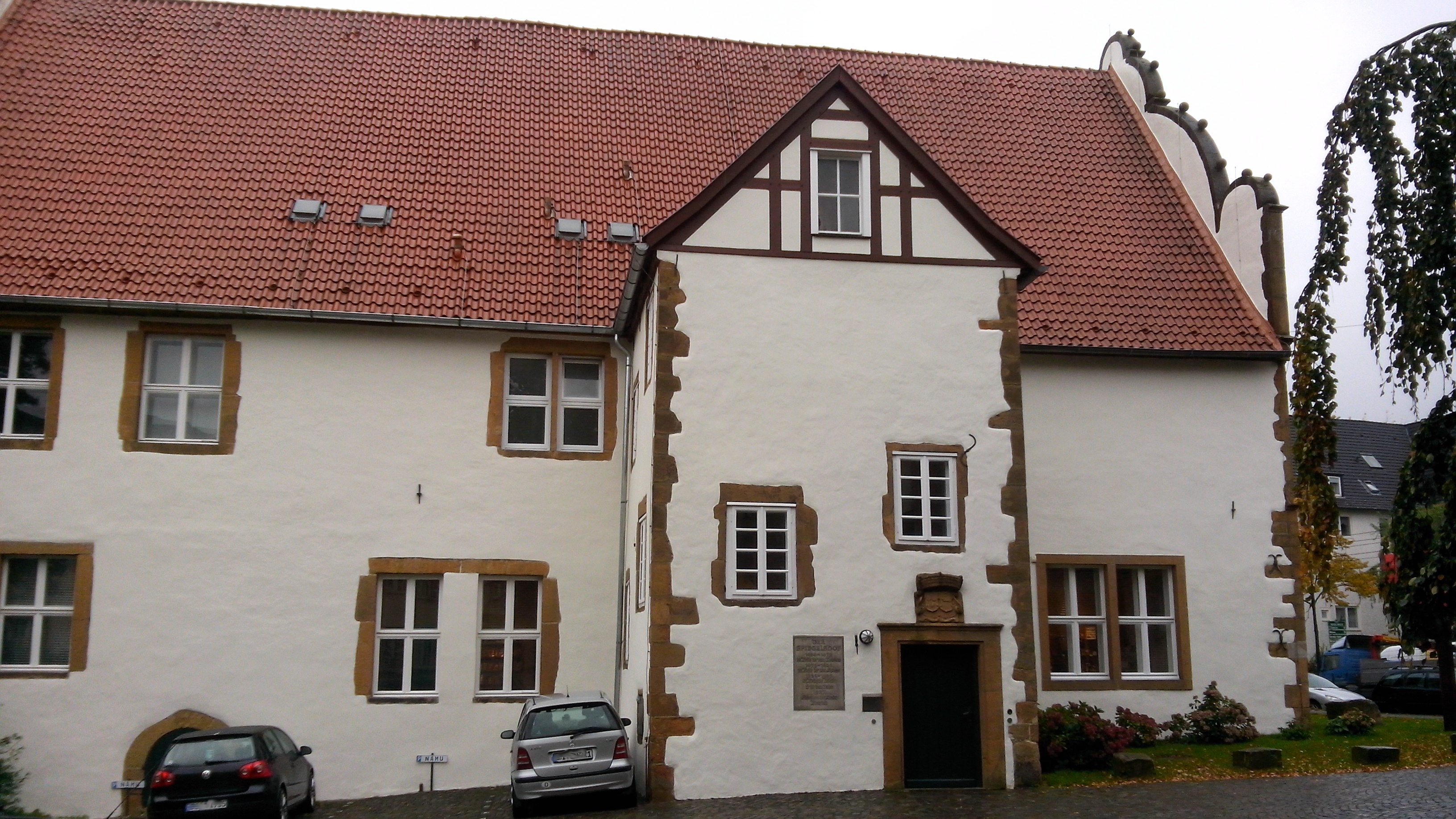 Eingang zum Naturkundemuseum namu im Spiegelschen Hof in Bielefeld.